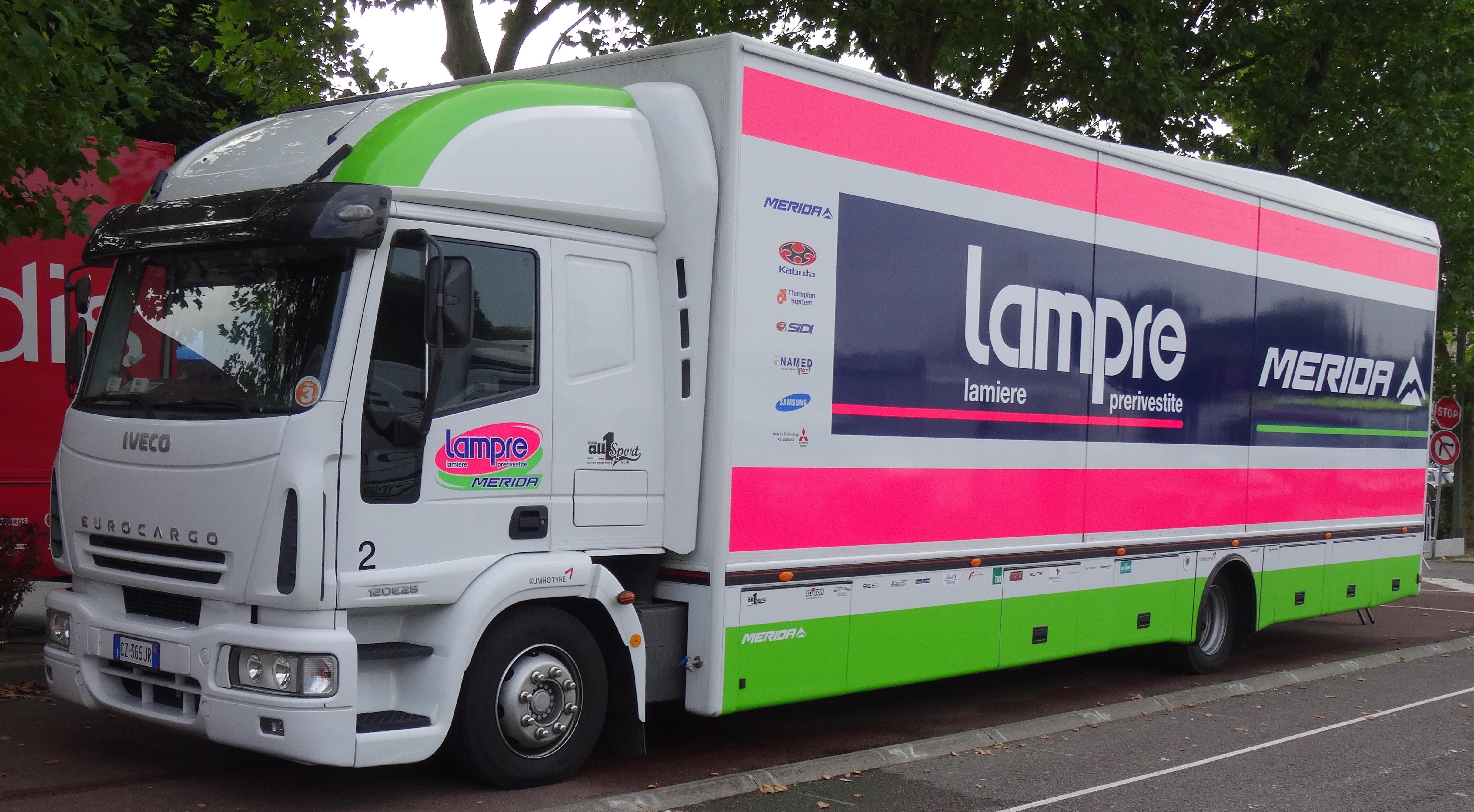 Reportage photographique réalisé le dimanche 7 septembre à l'occasion du départ et de l'arrivée du Grand Prix de Fourmies 2014 à Fourmies, Nord-Pas-de-Calais, France.